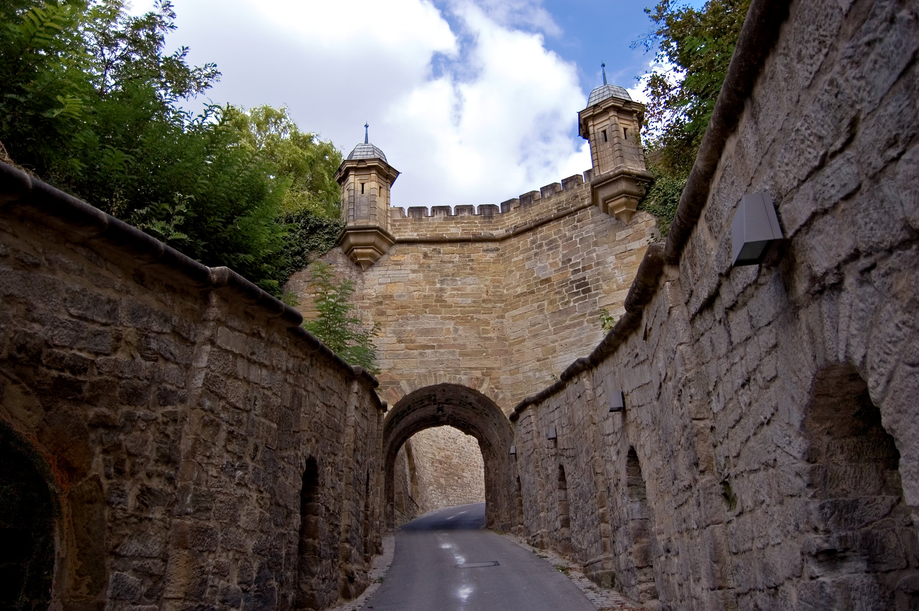 Zufahrt zur Festung Hohenasperg Justizvollzugskrankenhaus